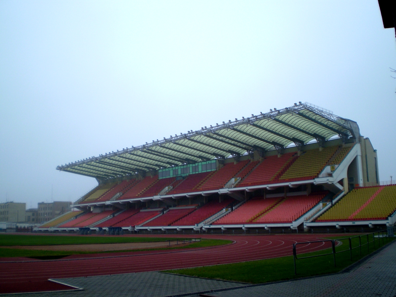 АСК "Брэсцкі"